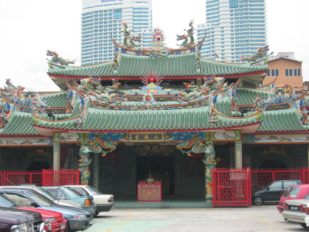 Self taken.